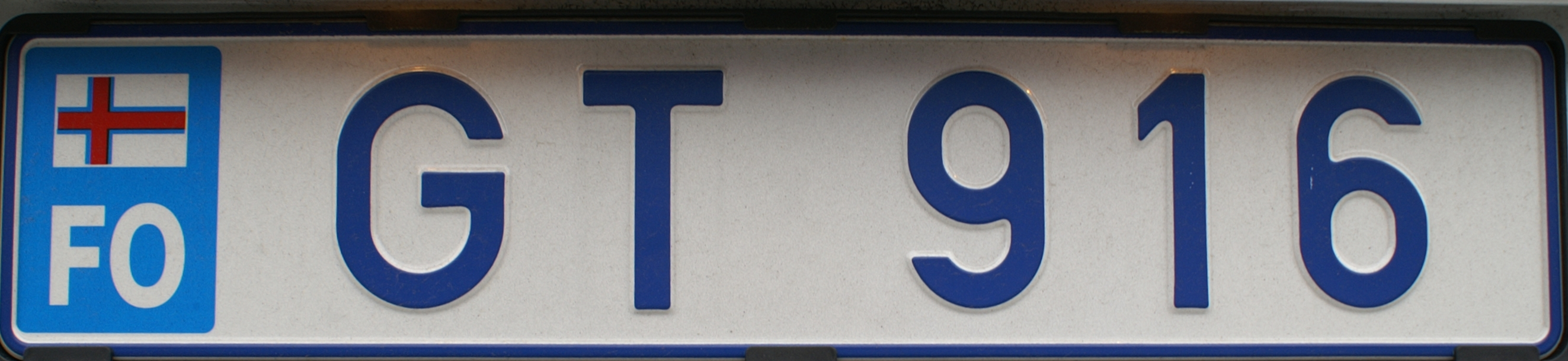 licenseplate of Faroe Islands